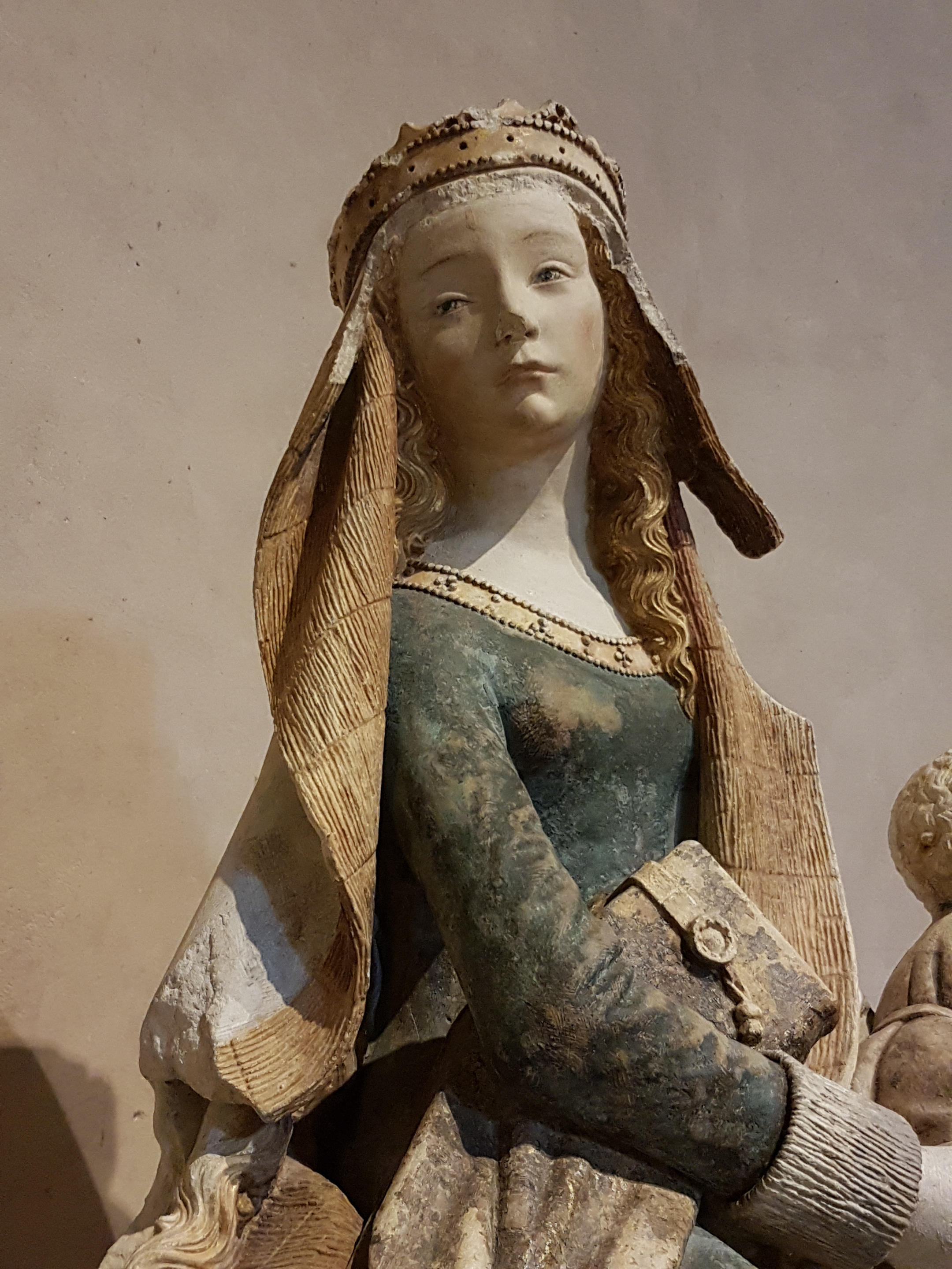 Notre-Dame de Grasse - Musée des Augustins, Toulouse. Détail.